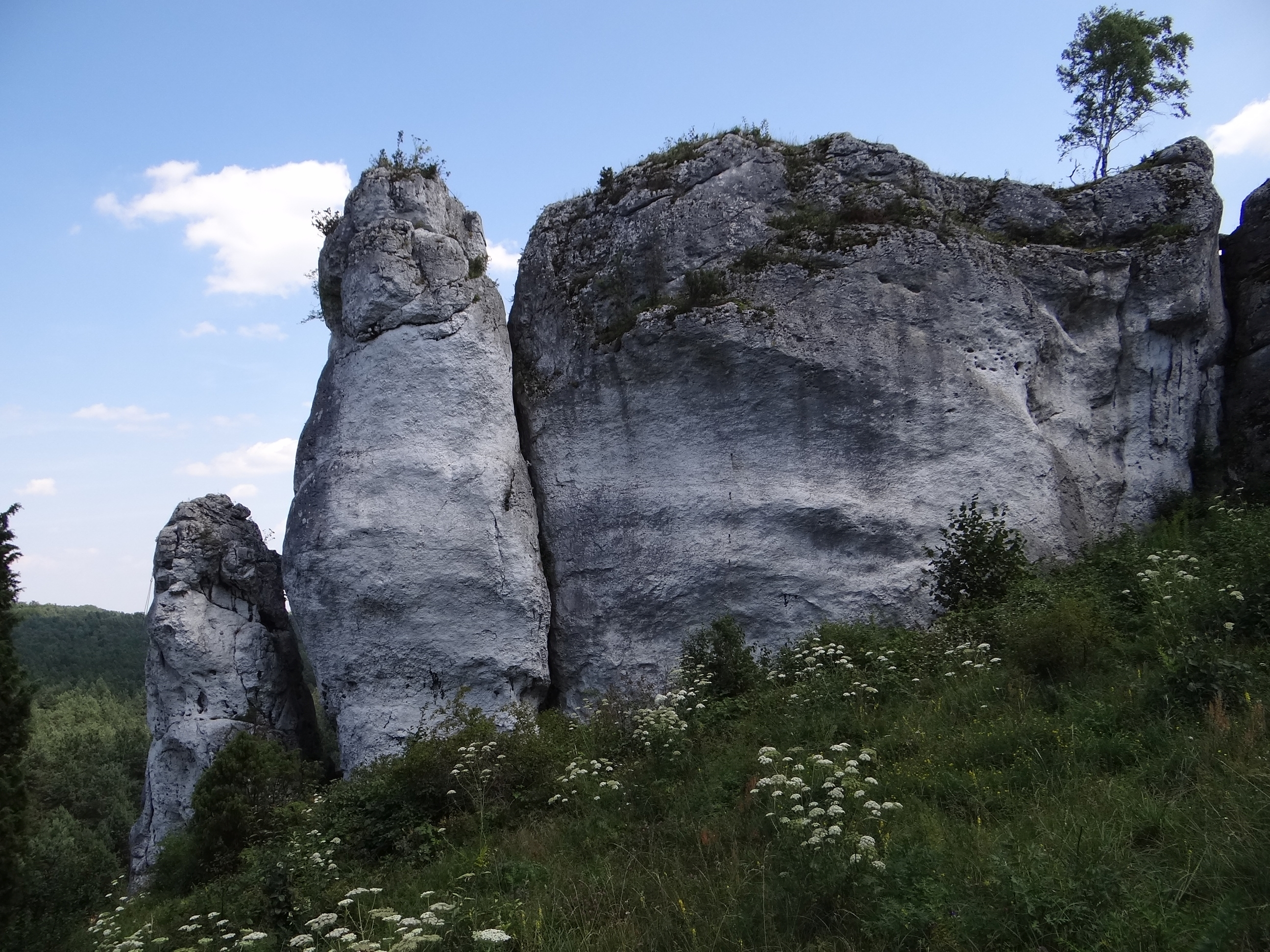 Mniszek i Szeroka Baszta w grupie Mirowskich Skał. Widok od zachodu